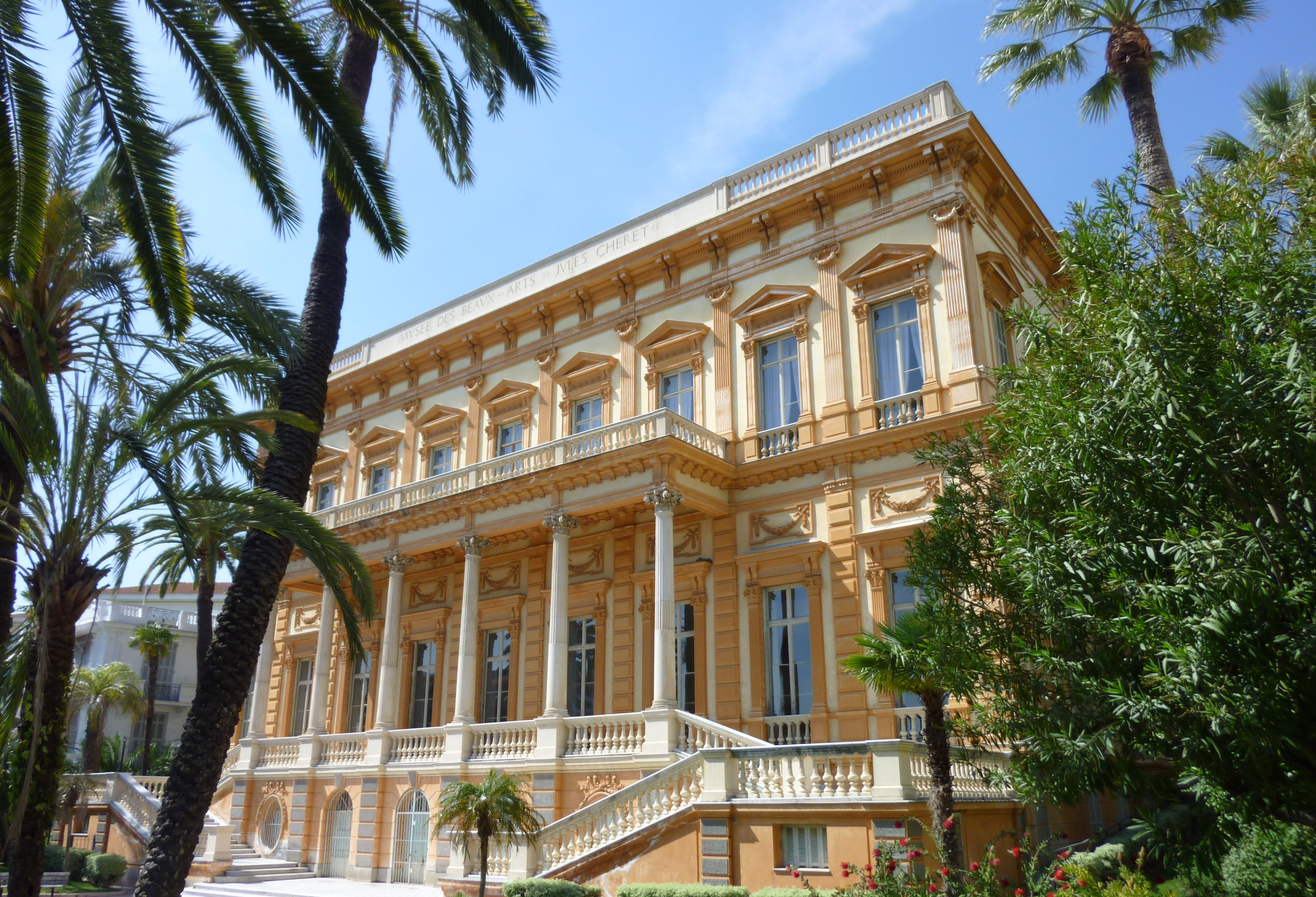 Villa Thomson, actuel musée des beaux-arts Jules Chéret, (Nice, Alpes-Maritimes, France) .